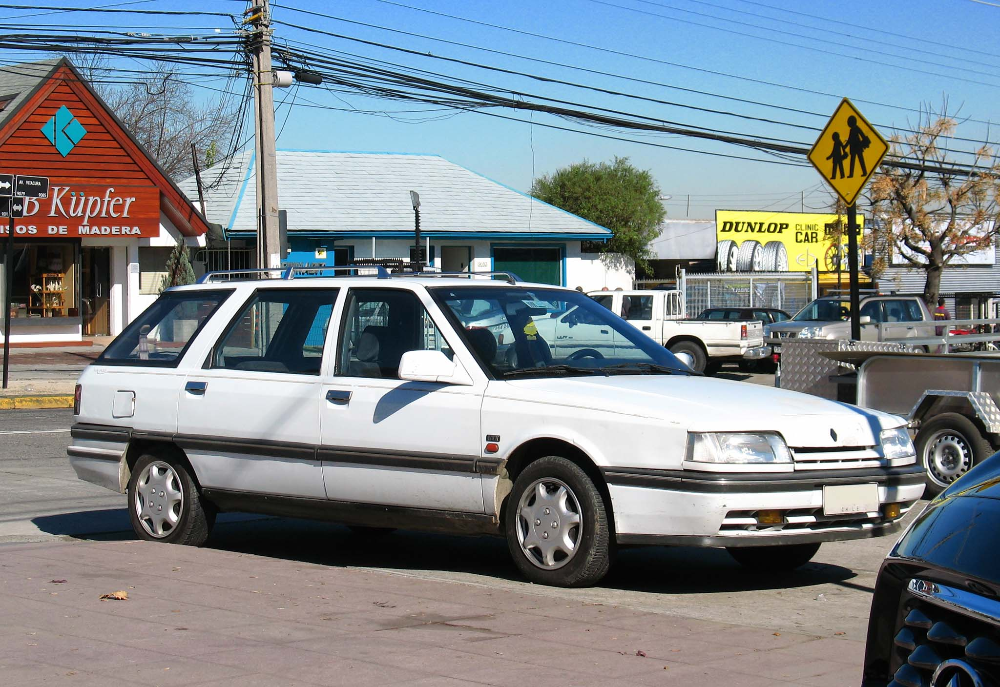 renault 21 nevada